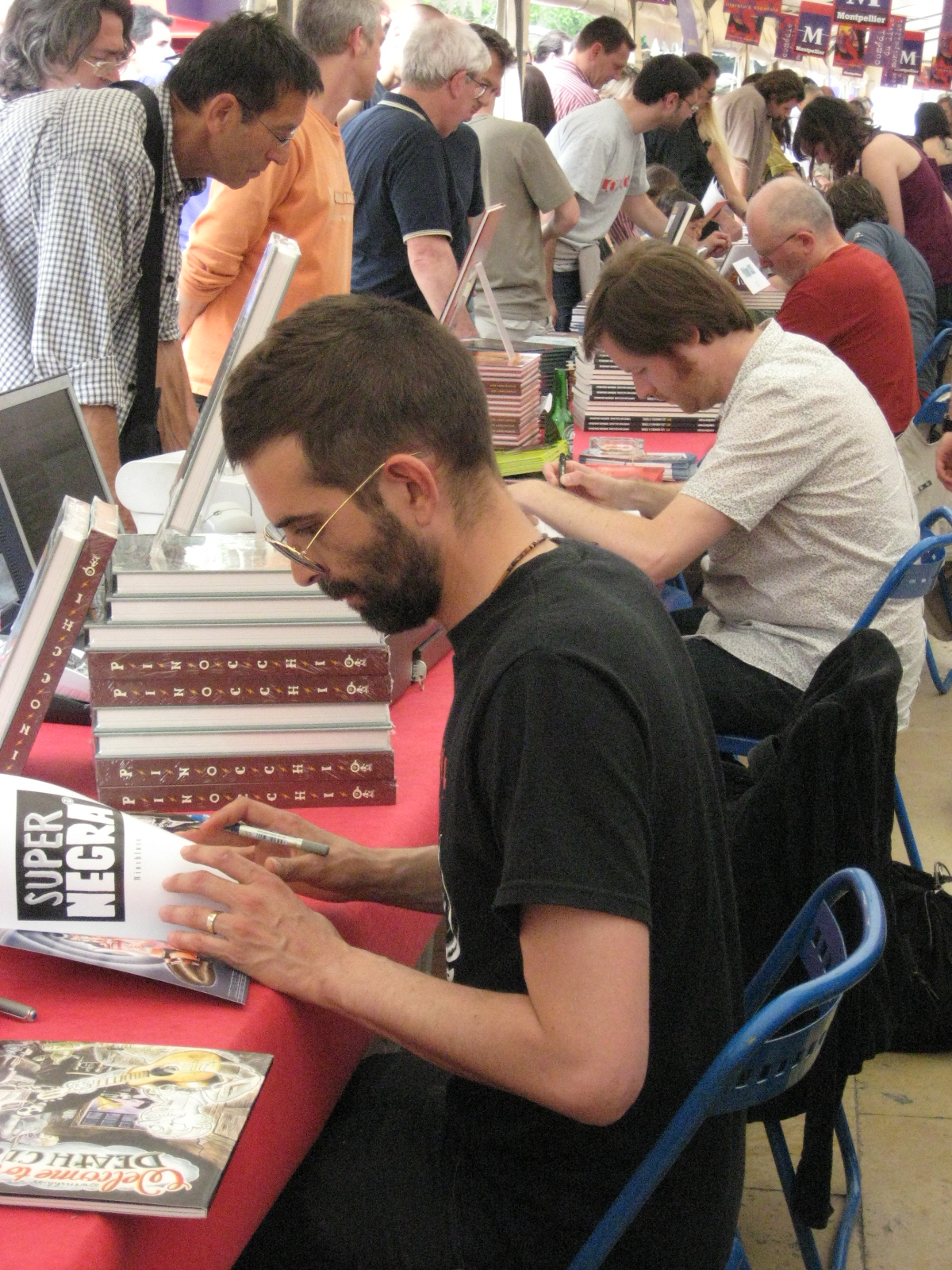 Winshluss à La Comédie du livre de Montpellier, 22 mai 2009